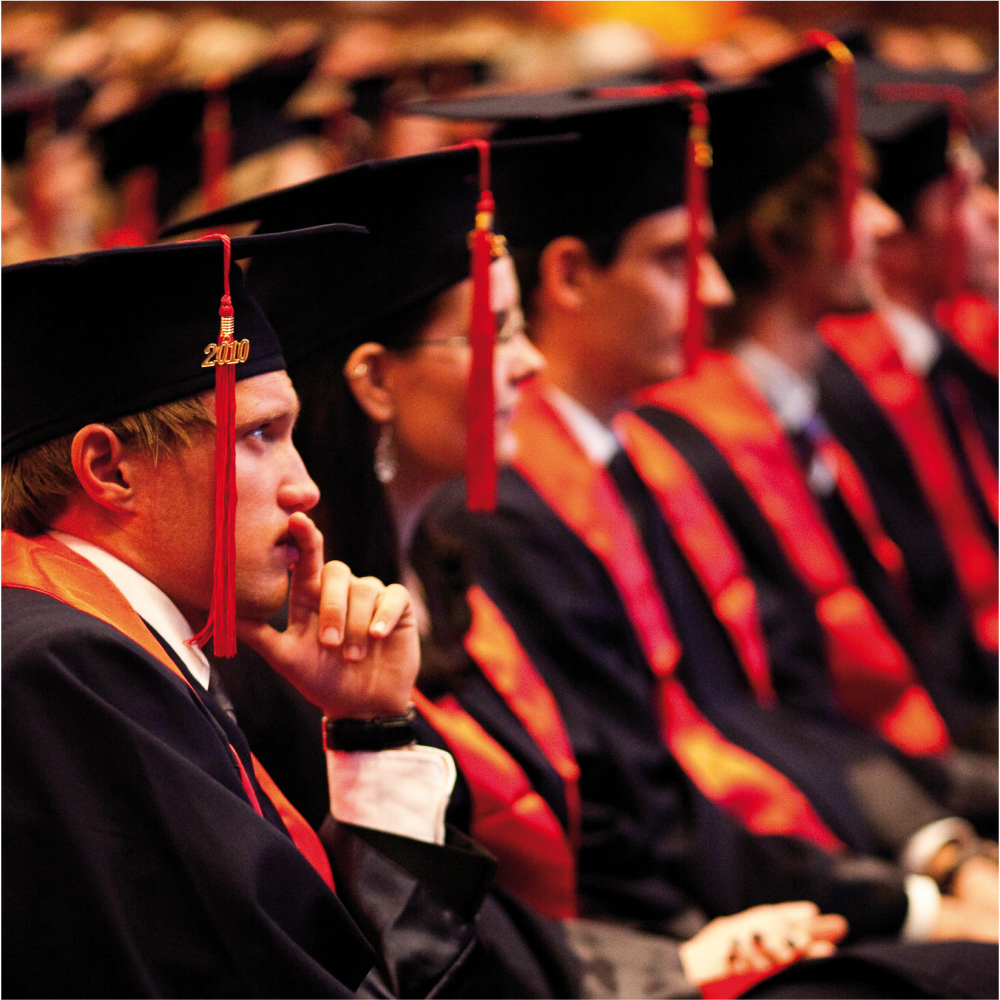 Akademische Feier accadis Bad Homburg